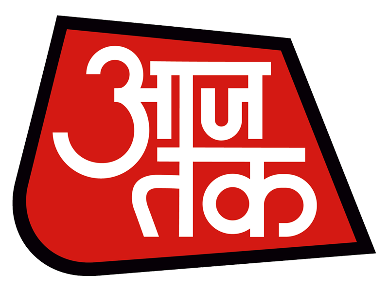 Logo des 24 stündig sendenden Hindi-Nachrichtenkanals Aaj tak der indischen TV Today Network-Gruppe